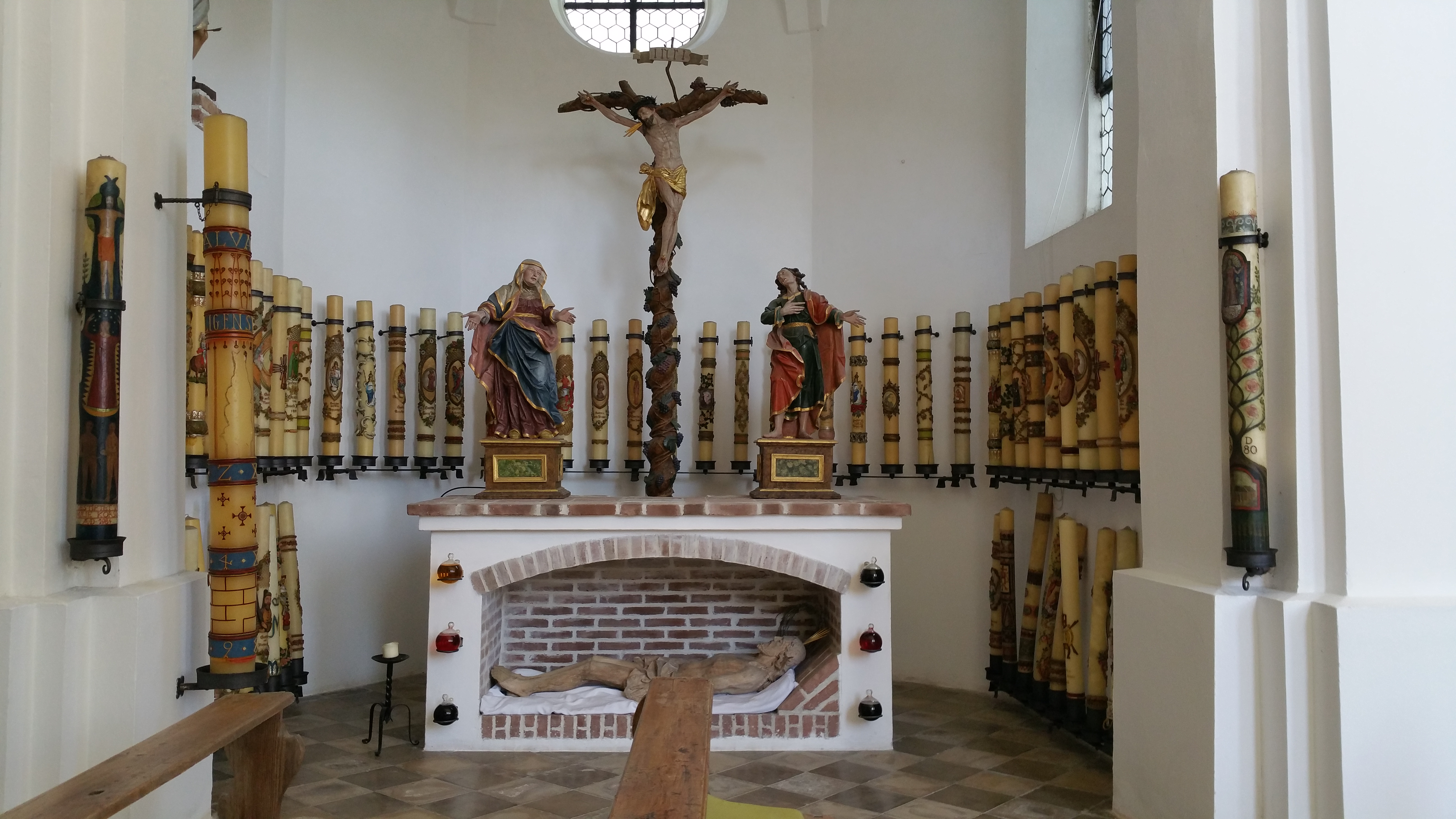 Boarisch: Niederbayern